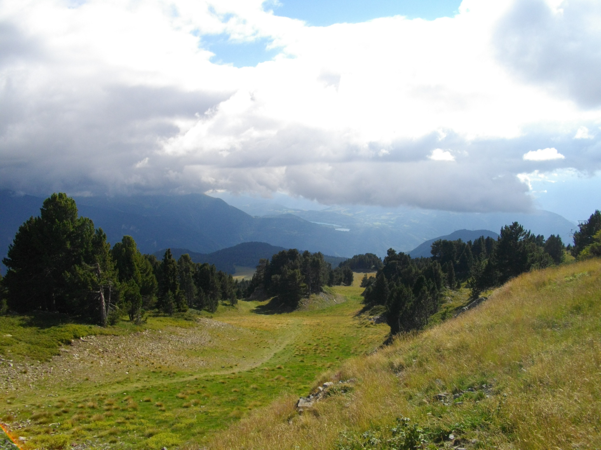 Descente de piste de ski de fond, lacs de Laffrey.